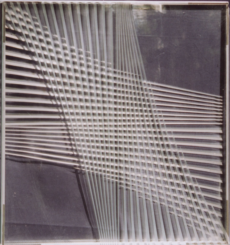 Szilágyi András Interferencia című alkotása, többször szerepelt kiállításon, a Vigadó Galériában, a Mednyánszky Teremben egyaránt.